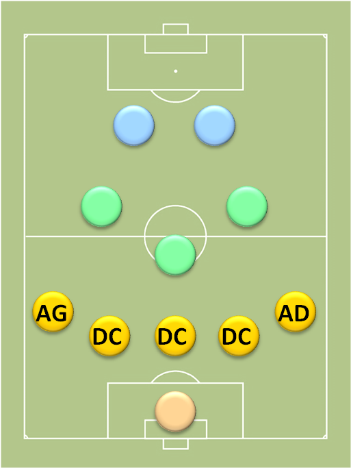 Positions_au_football_des_défenseurs_dans_un_5-3-2